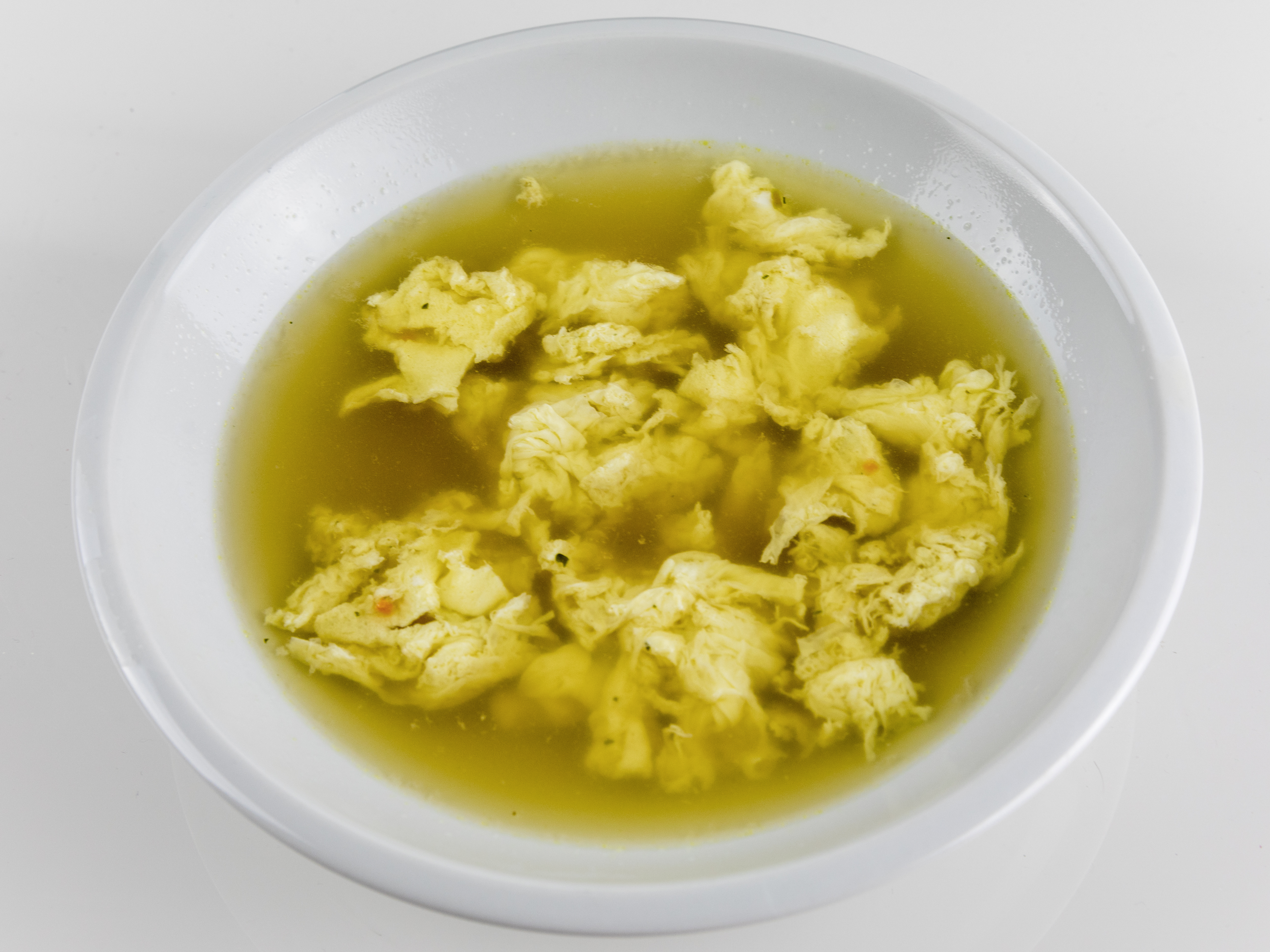 Einlaufsuppe im Teller